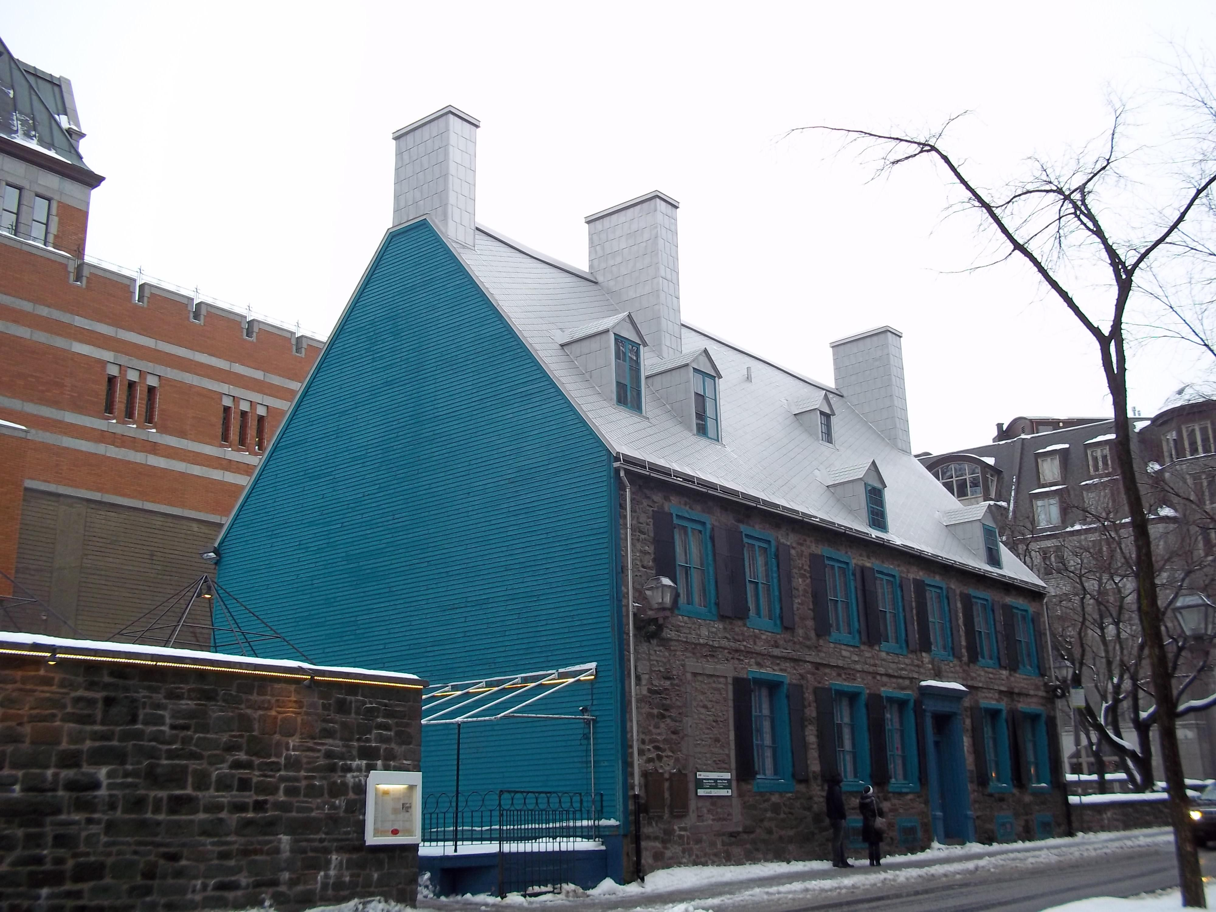 Maison Maillou, rue Saint-Louis, Québec Lieux patrimoniaux du Canada